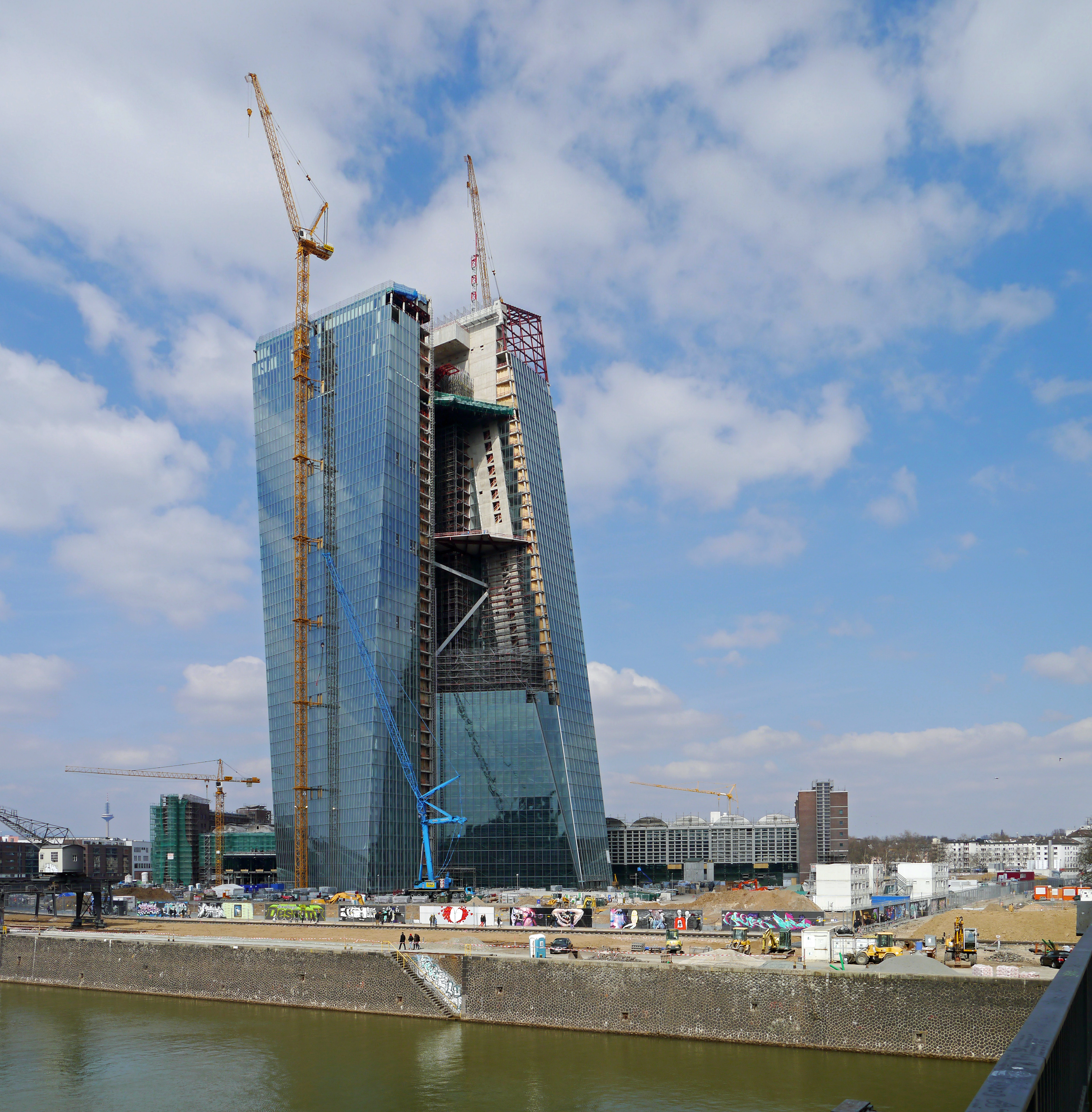 Die EZB-Neubaustelle (April 2013) von der Deutschherrnbrücke (zwischen Frankfurt-Ostend und Frankfurt-Sachsenhausen).